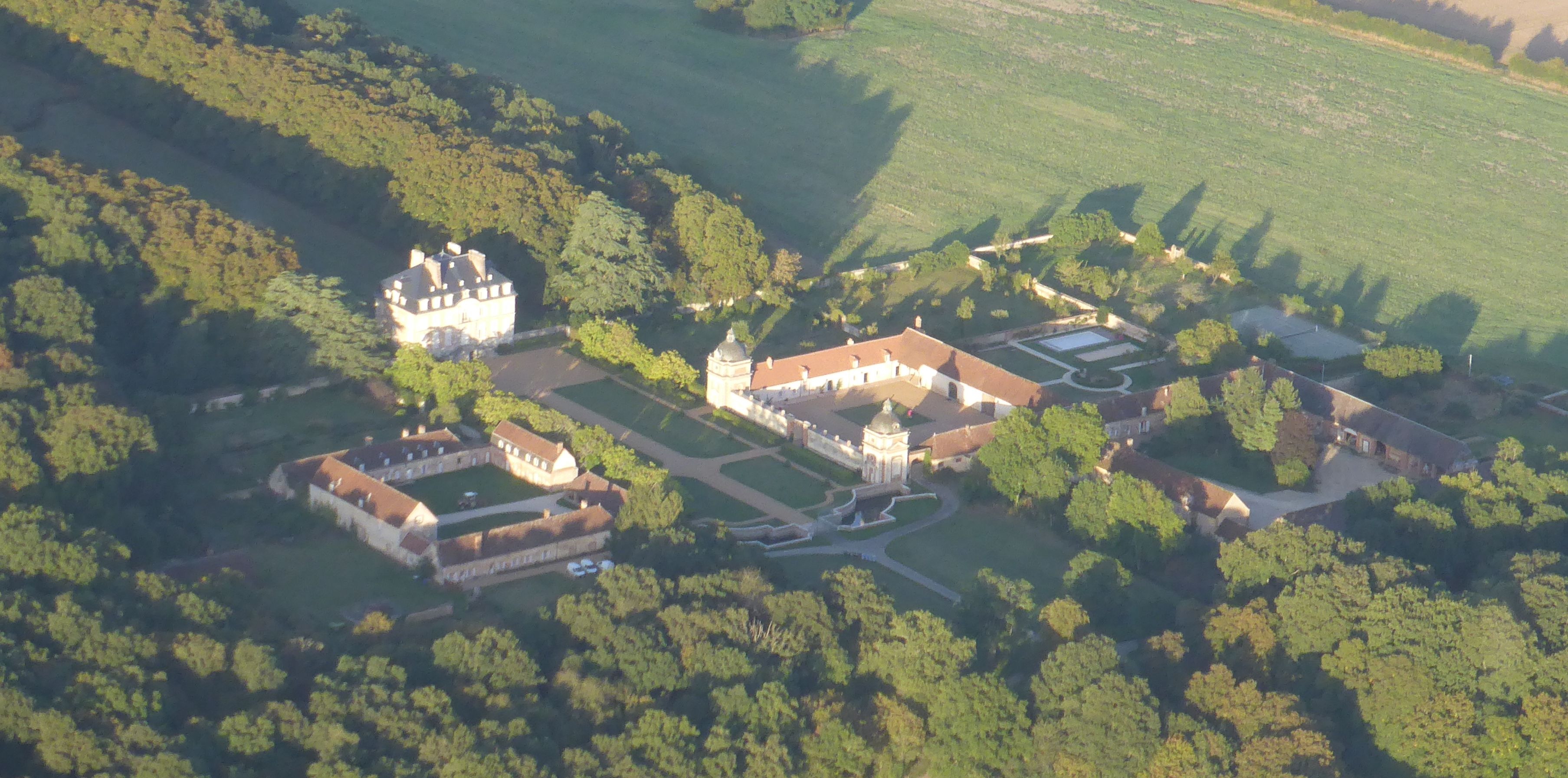 Château de Reverseaux (photo aérienne 25/09/2016)